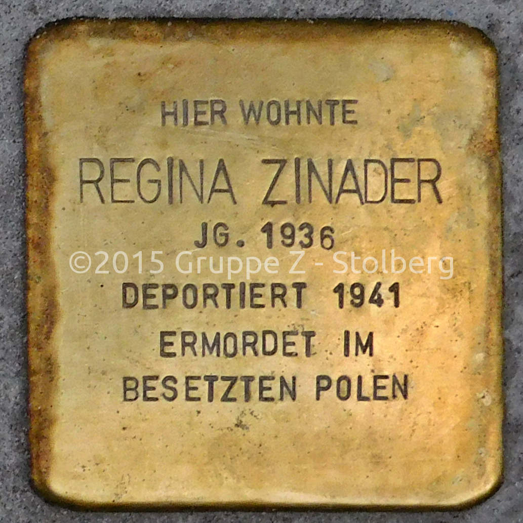 Stolperstein für Regina Zinader verlegt am 18. Dezember 2015